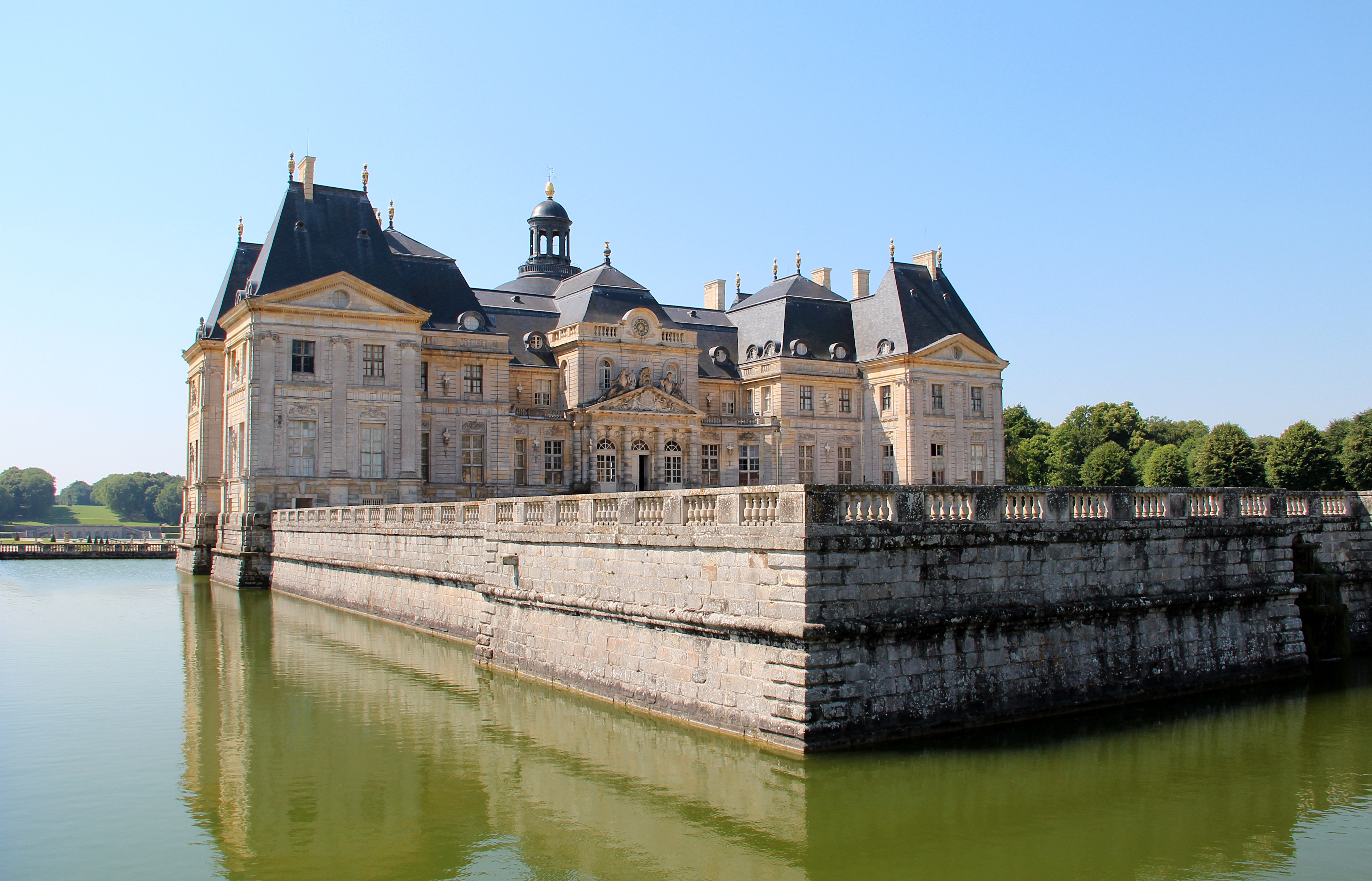 Douves, cour d'honneur et côté sud-ouest du château de Vaux-le-Vicomte - Maincy (Seine-et-Marne, France).